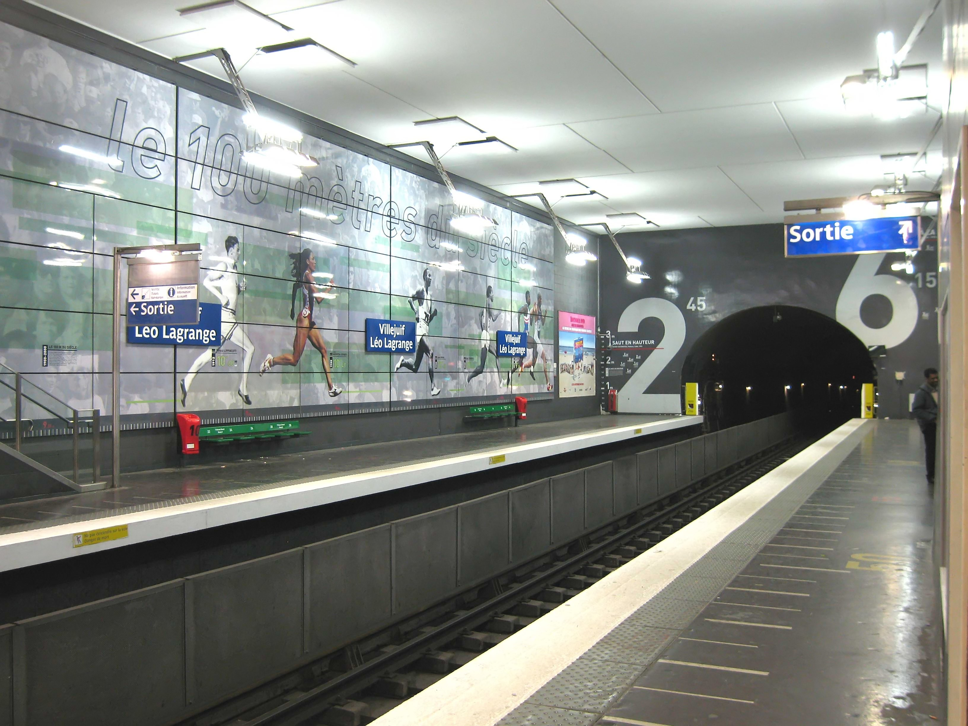 Métro de Paris, Station Villejuif Léo lagrange (ligne 7), Paris, France